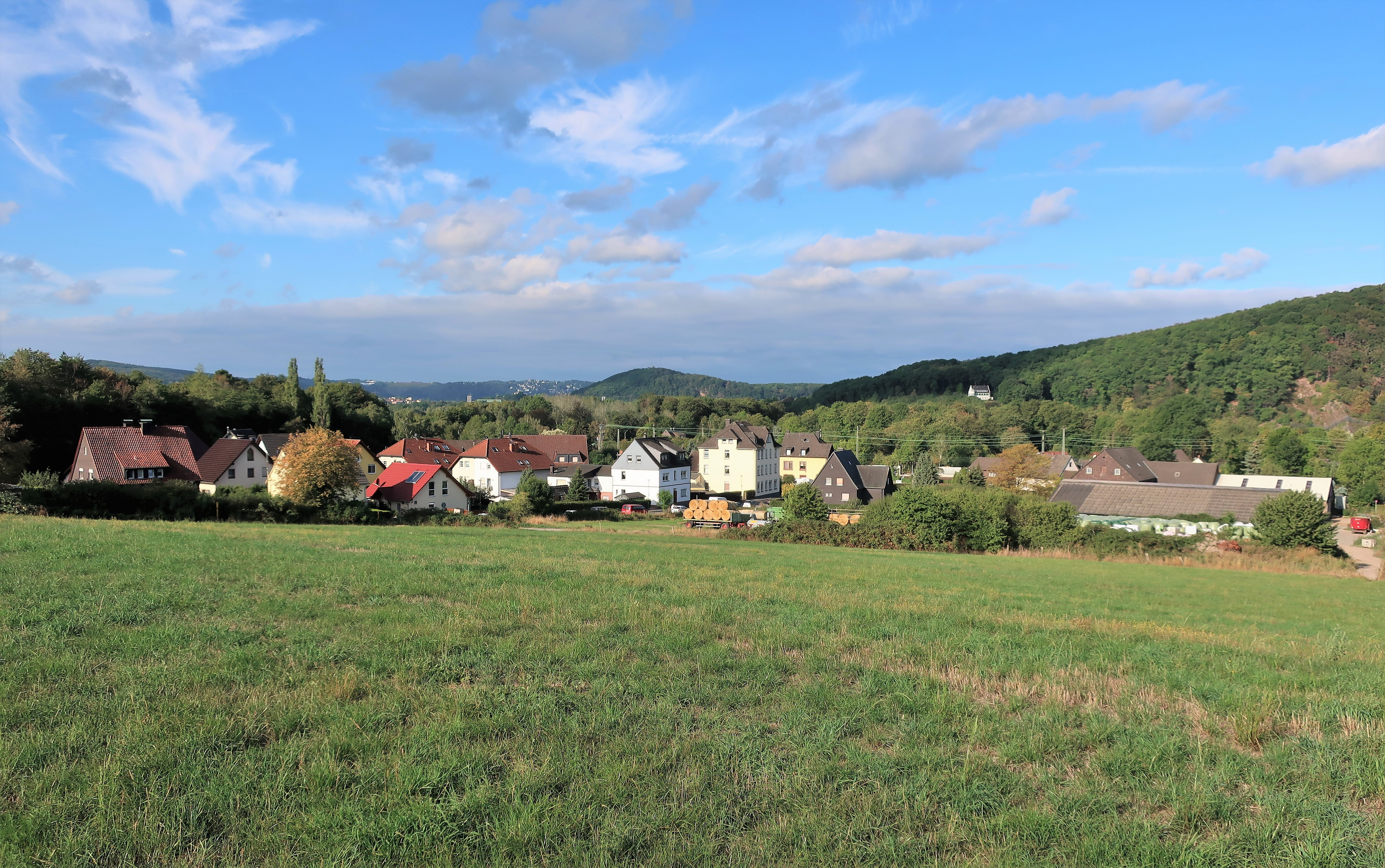 Blick von Osten auf den Hagener Ortsteil Hengstey. – Hengstey wurde erstmals 1229 in dem Güter- und Einkünfteregister des Frauenkonvents und späteren adligen Damenstifts Herdecke erwähnt. Im Schatzbuch der Grafschaft Mark von 1486 wurden in der Bauerschaft Hengstey (Hemsteden) acht steuerpflichtige Hofbesitzer mit einer Abgabe zwischen 1 oirt (¼ Gg) und 6 Goldgulden genannt. Darunter auch der Hofbesitzer Einhaus (Hanß eyn huyß), nachdem heute in Hengstey eine Straße benannt ist.